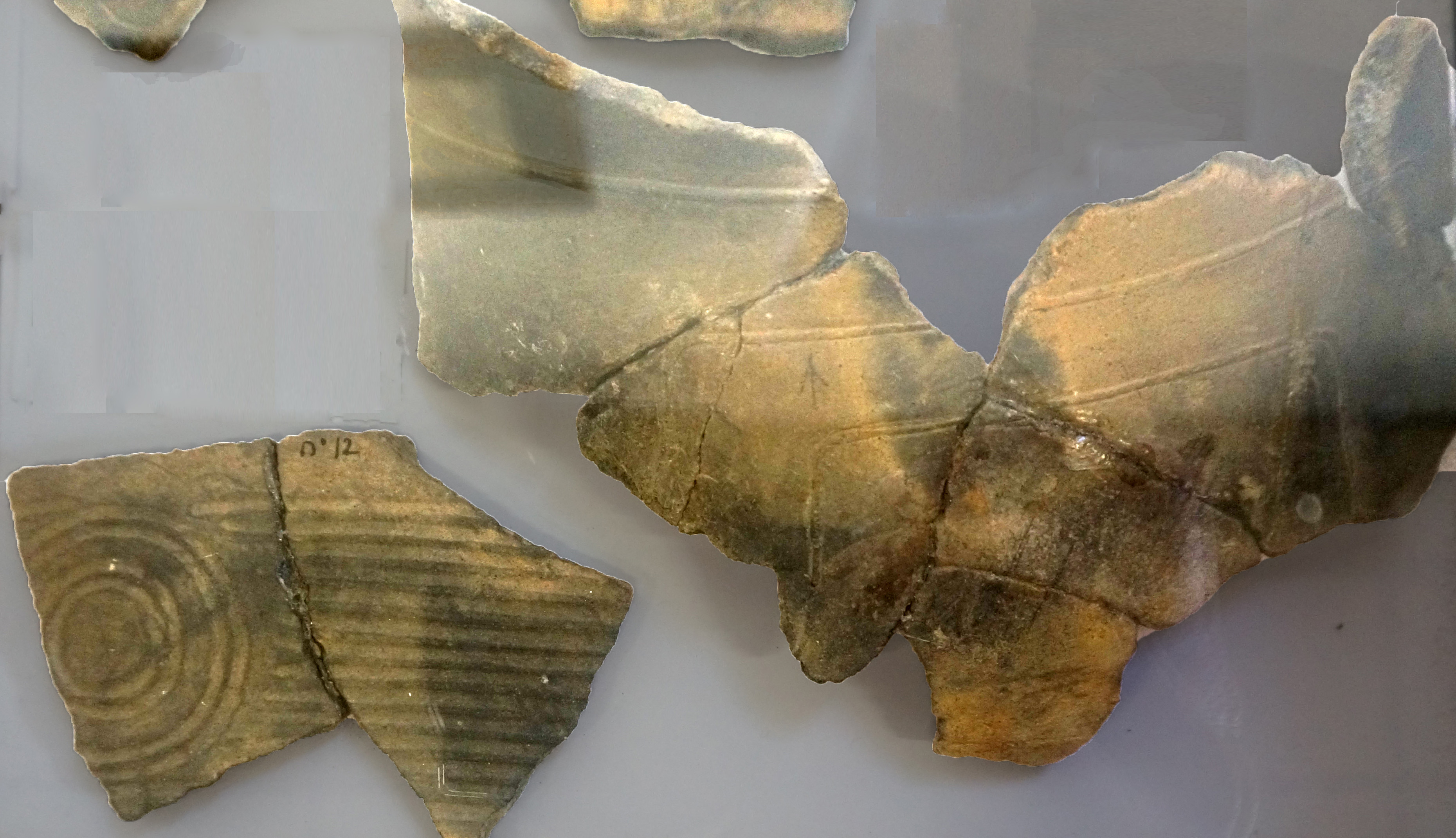 présentées au Musée archéologique de Pons.